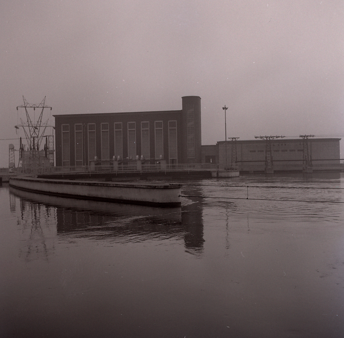 Servizio fotografico : Vizzola Ticino, 1968 / Paolo Monti. - Buste: 6, Fototipi: 6 : Negativo b/n, gelatina bromuro d'argento/ pellicola ; 6x6. - ((Serie costituita da 6 negativi identificati con i nn.: 21630-21635. Sulla busta R21630 manoscritto: "Vizzola/ Turbigo". La suddetta serie è contenuta nella scatola identificata con la numerazione R21559-21766. Sul coperchio iscrizione manoscritta a pennarello: "Industrie"